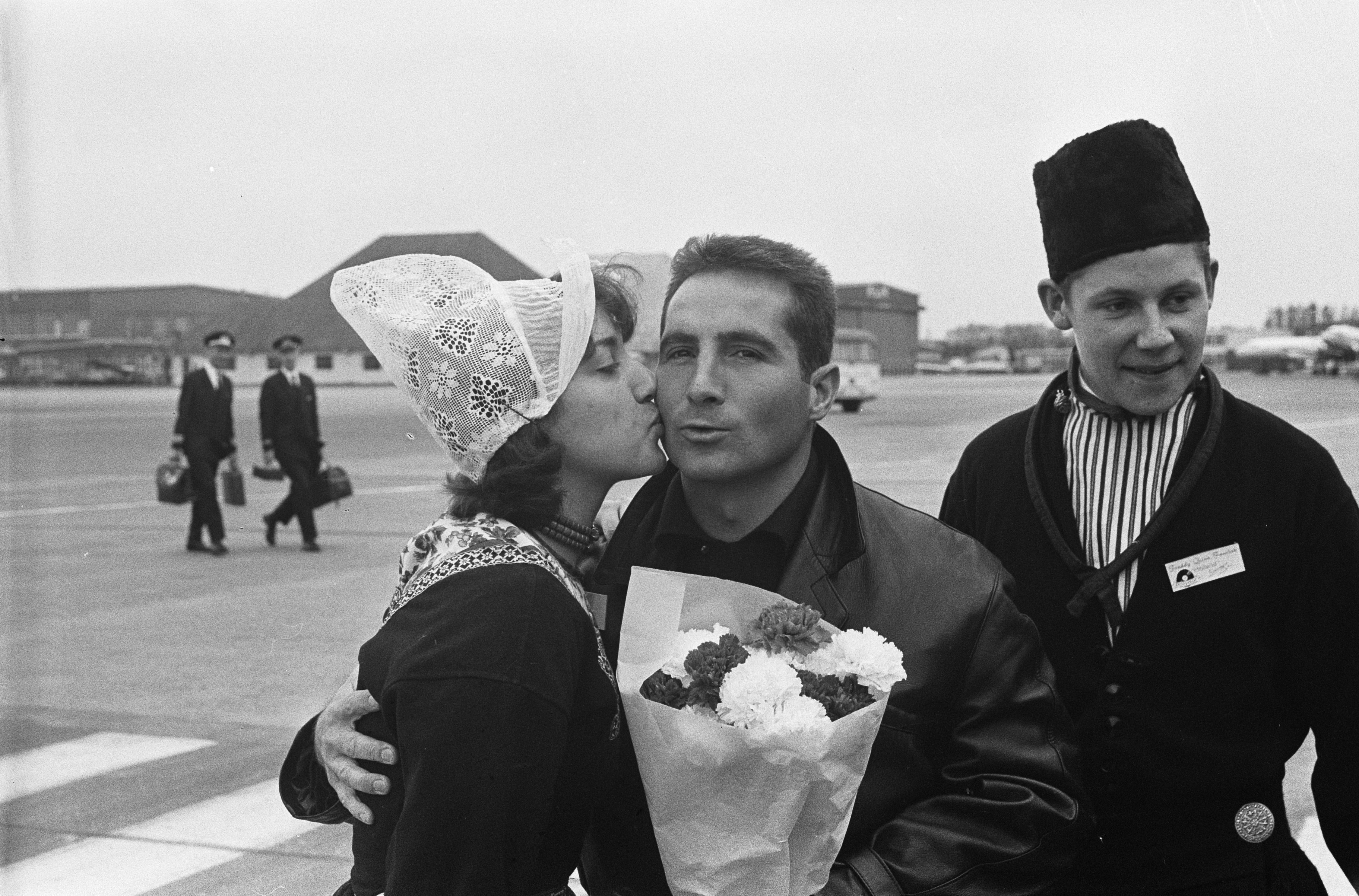 Collectie / Archief : Fotocollectie Anefo Reportage / Serie : [ onbekend ] Beschrijving : Bekende teenagerster Freddy Quinn in ons land Datum : 10 oktober 1963 Locatie : Noord-Holland, Schiphol Trefwoorden : klederdrachten, muziek, vliegvelden, zangers Persoonsnaam : Quinn Freddy Fotograaf : Gelderen, Hugo van / Anefo Auteursrechthebbende : Nationaal Archief Materiaalsoort : Negatief (zwart/wit) Nummer archiefinventaris : bekijk toegang 2.24.01.05 Bestanddeelnummer : 915-6180